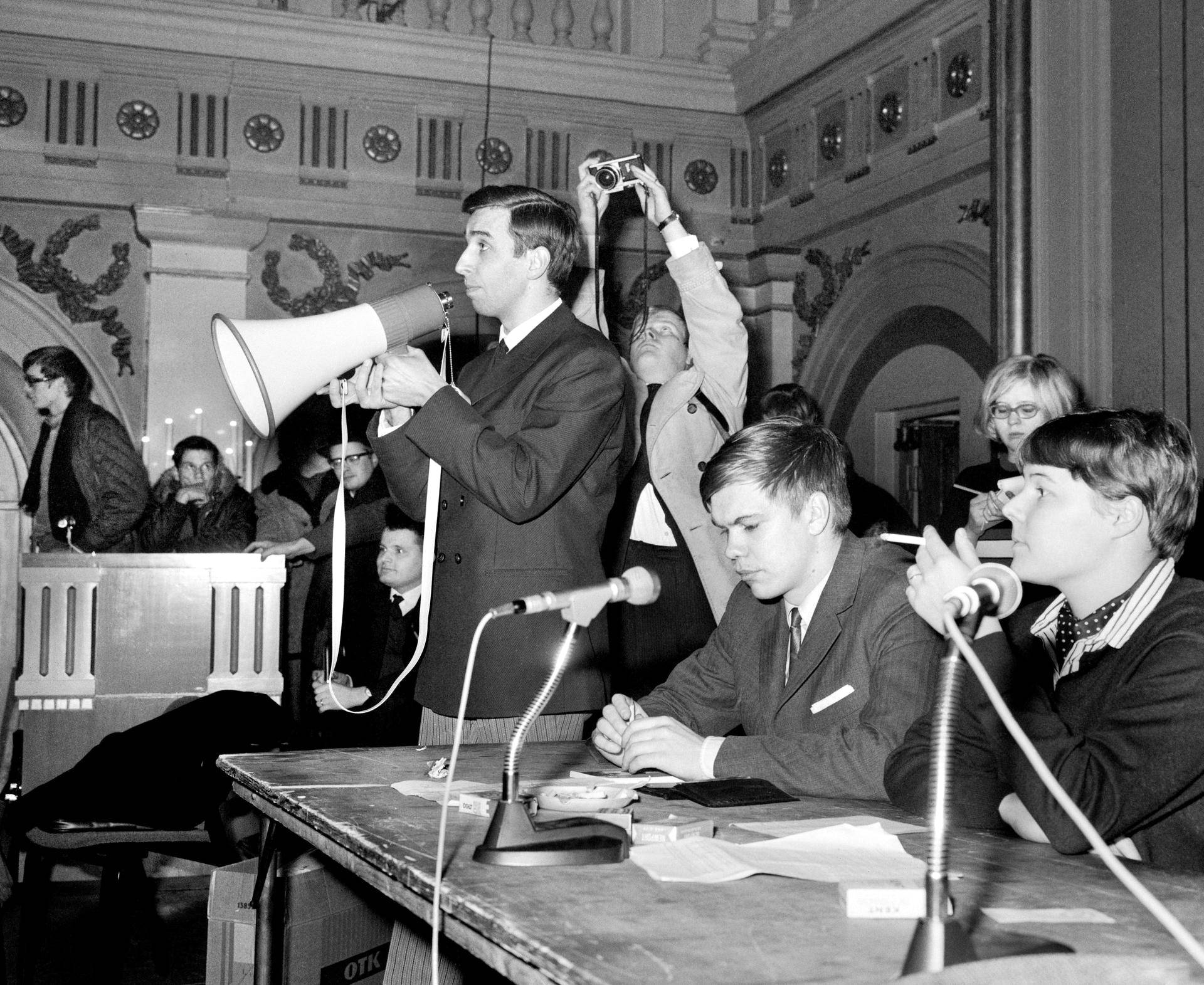 Vanhan ylioppilastalon valtaajia: vasemmassa laidassa Nils Torvalds; pöydän takana istumassa Marianne Laxen (oik.) vieressään Jarmo Mäkelä; megafonia pitää Elias Tunkelo, hänestä vasemmalle alhaalla vasemmalla Jyrki Vesikansa.